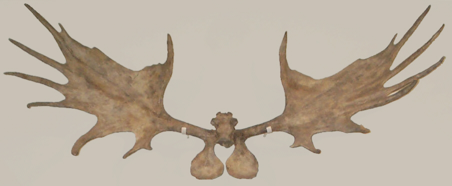 Geweih eines Steppenriesenhirsches, Megaloceros giganteus antecedens, Spannweite ca. 2,60 Meter (Ausgestellt im Urmenschmuseum Steinheim)